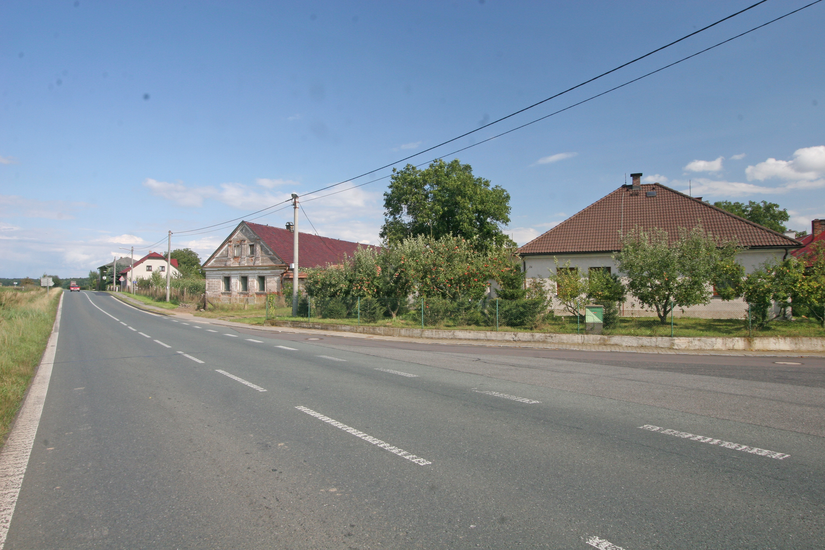 Hořenice čp. 18